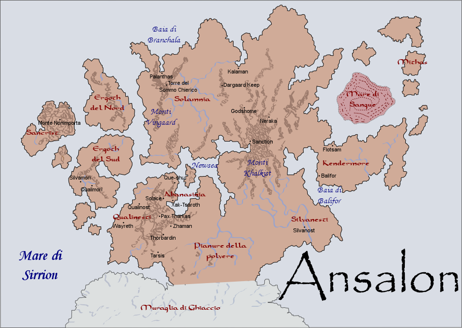 Mappa dettagliata di Ansalon con i nomi delle principali città